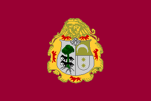 Bandera de Ermua, en Vizcaya (España)